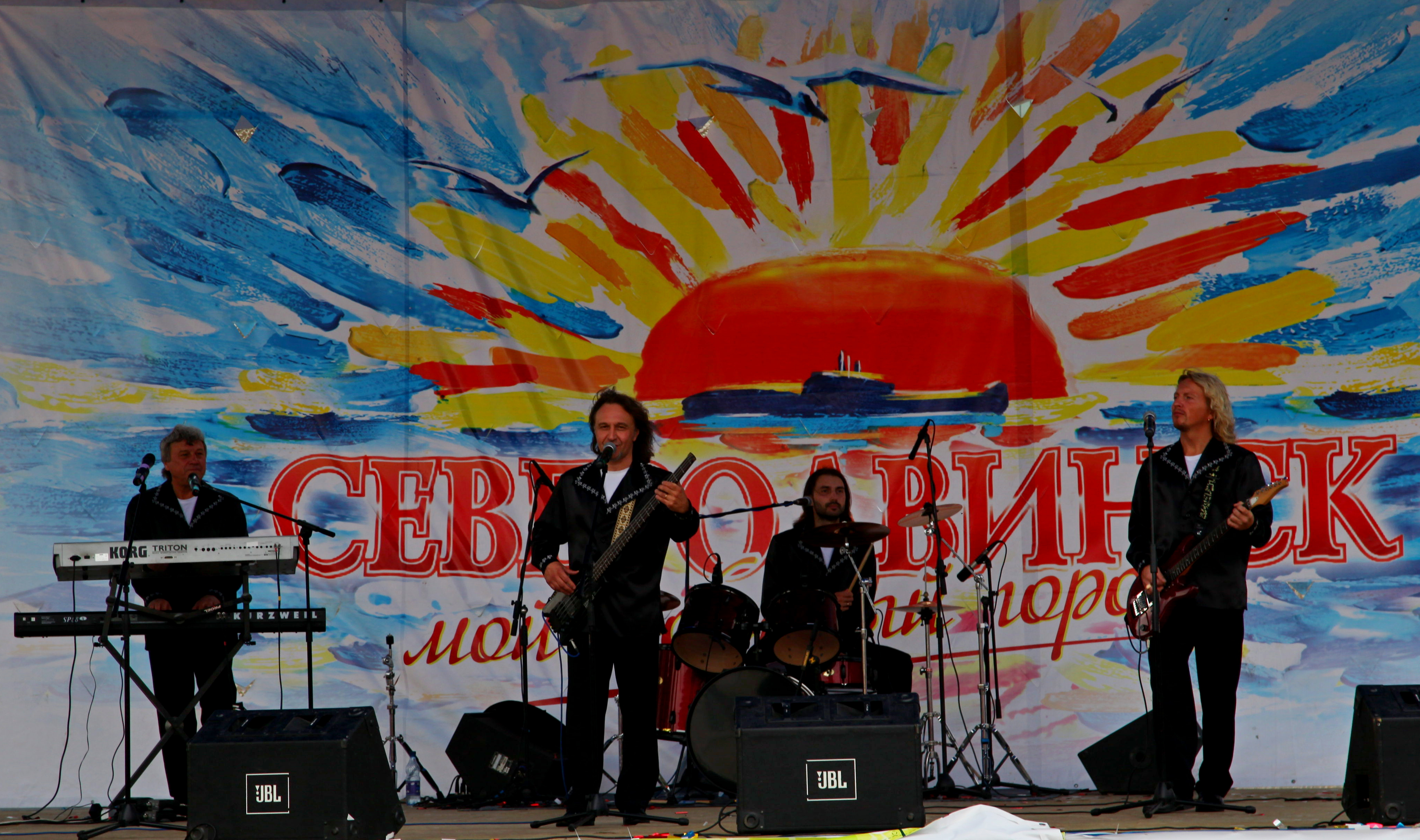 Группа Сябры. Выступление на Дне города Северодвинска (29 июля 2012 года). Организатор — концертное агентство Северяночка.